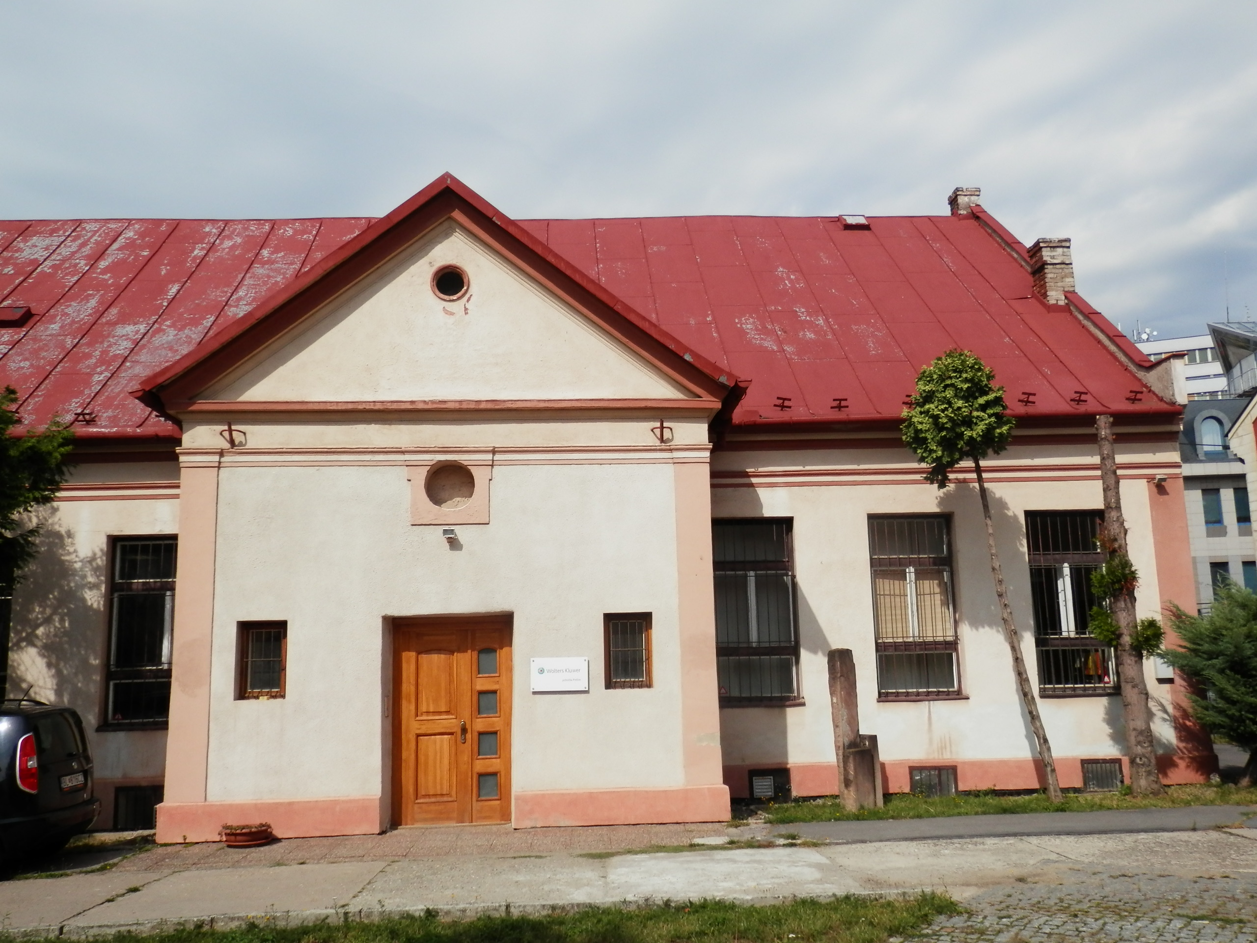 Klaus synagóga v areáli židovskej ortodoxnej synagógy, ulica Okružná, mesto Prešov.